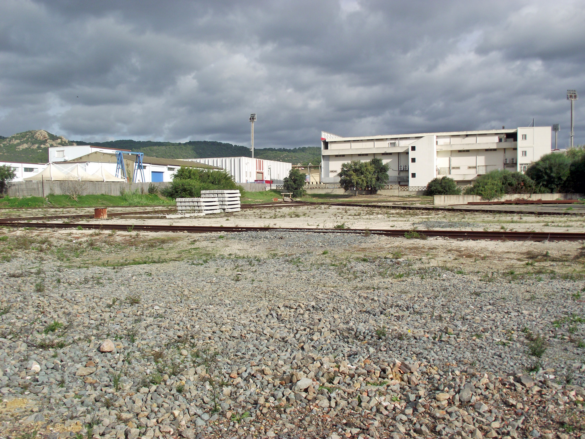 I binari che compongono la stella di inversione della stazione di Carbonia Stato